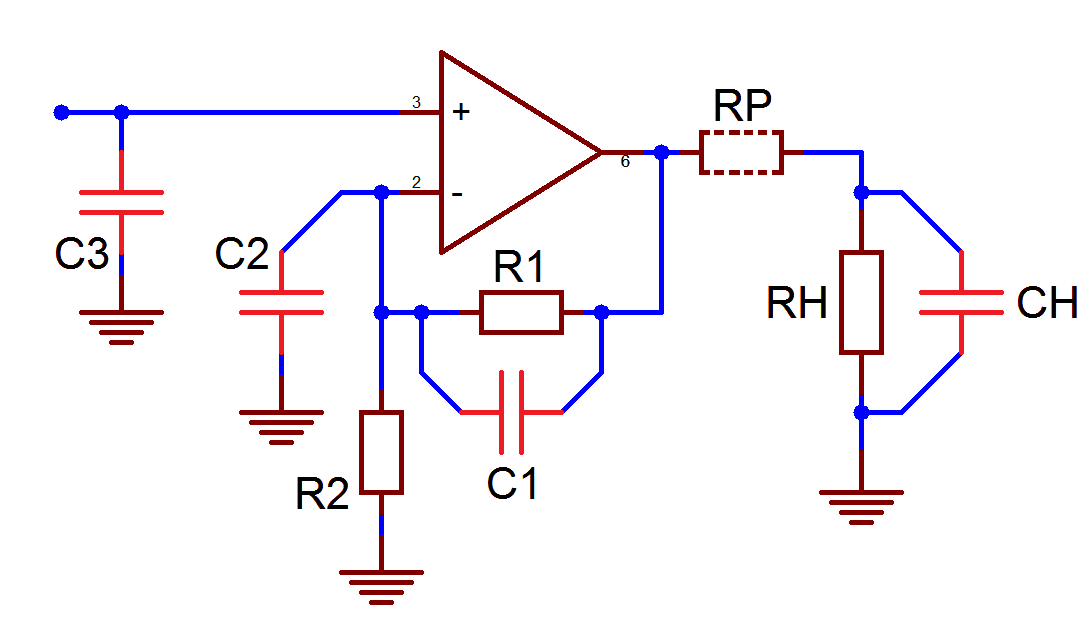 Паразитные ёмкости неинвертирующего усилителя на ОУ ТОС